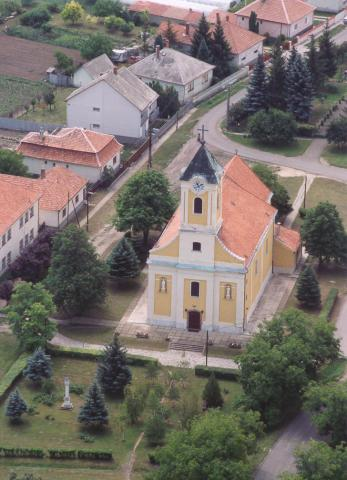 Boldog, Hungary, aerial photography; Szeplőtelen fogantatás római katolikus templom